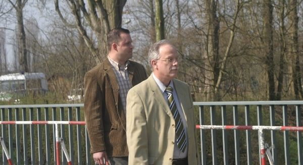 Der NPD-Delegierte Ingo Stawitz (rechts)auf dem Weg zum NPD-Bundesparteitag in Berlin.